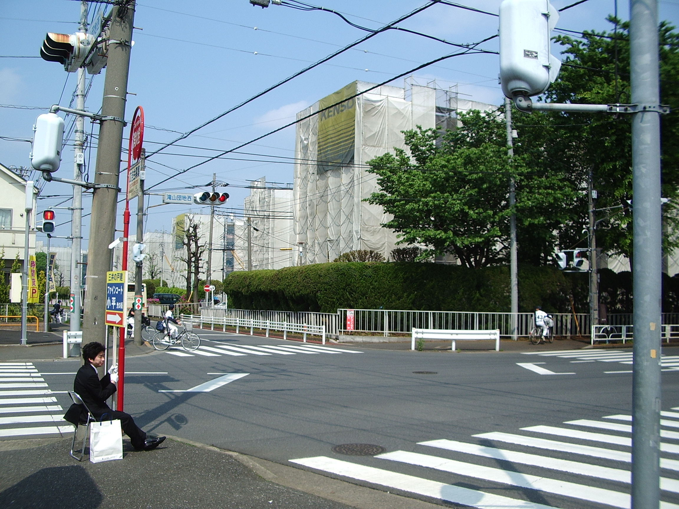 Takiyamadanchi, Higashikurume, Tokyo